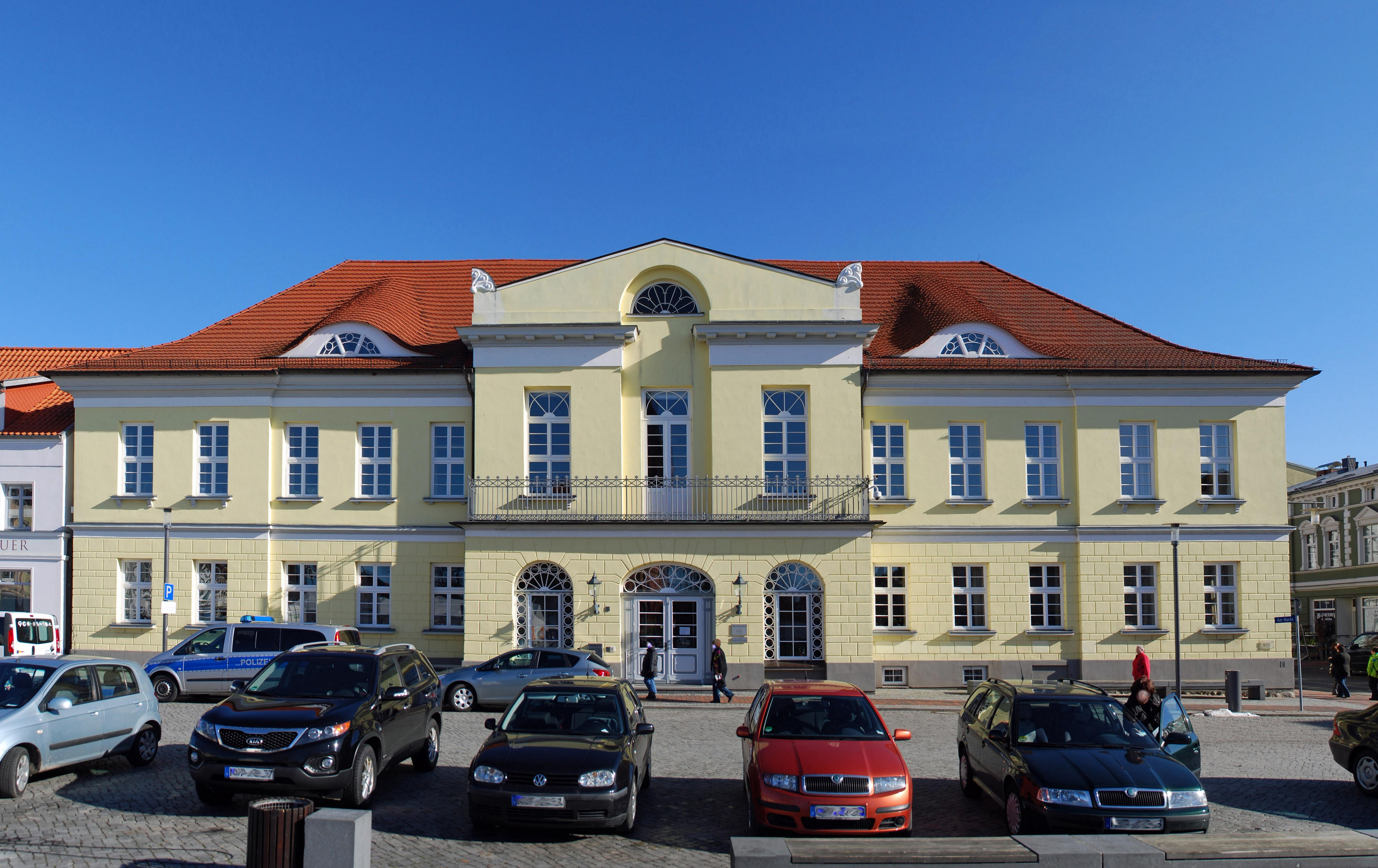 Gebäude und Denkmal in Ribnitz-Damgarten